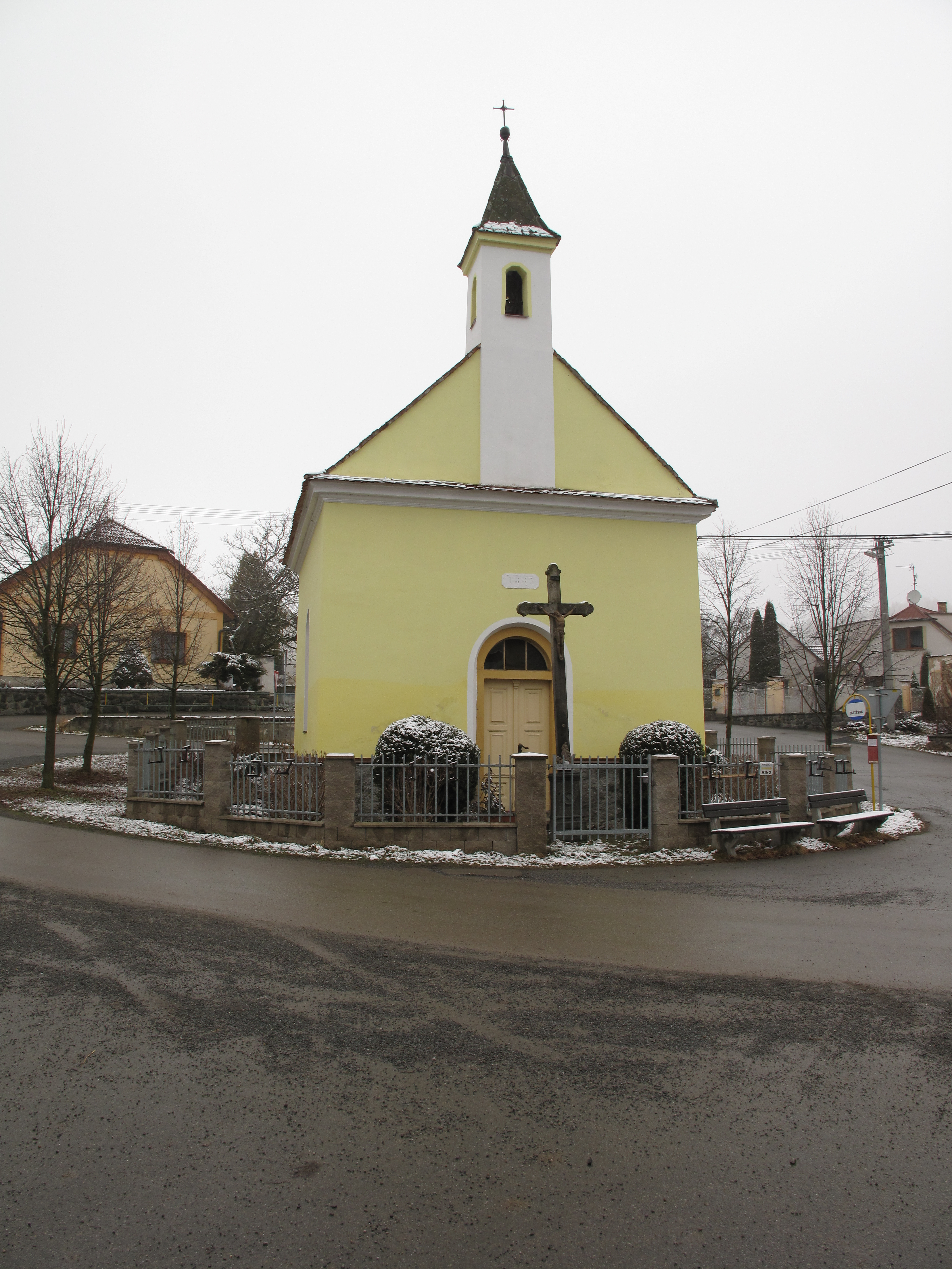 Kaplička ve Stříteži. Okres Strakonice, Česká republika.